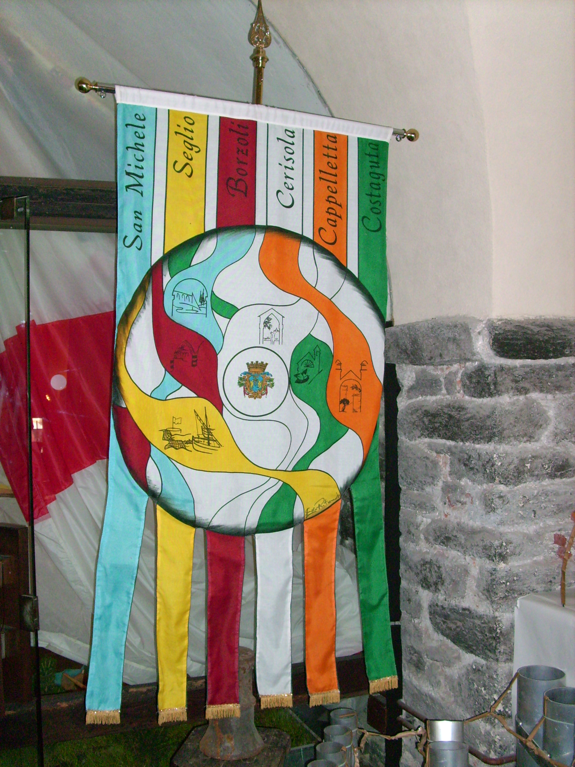 Bandiera dei Sestieri di Rapallo, Liguria, Italia